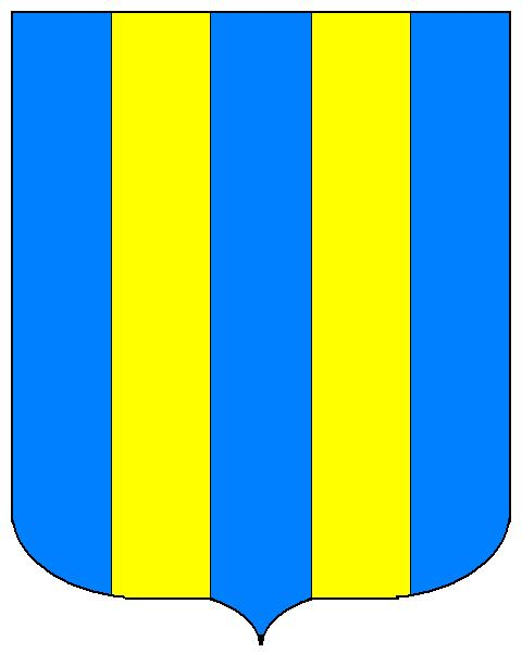 Grb obitelji Vitturi